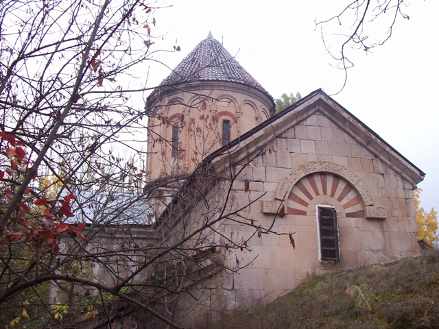 ხახული. (სერაფიტას პირადი არქივიდან. გადაღებულია 2008 წლის ოქტომბრის თვეში)